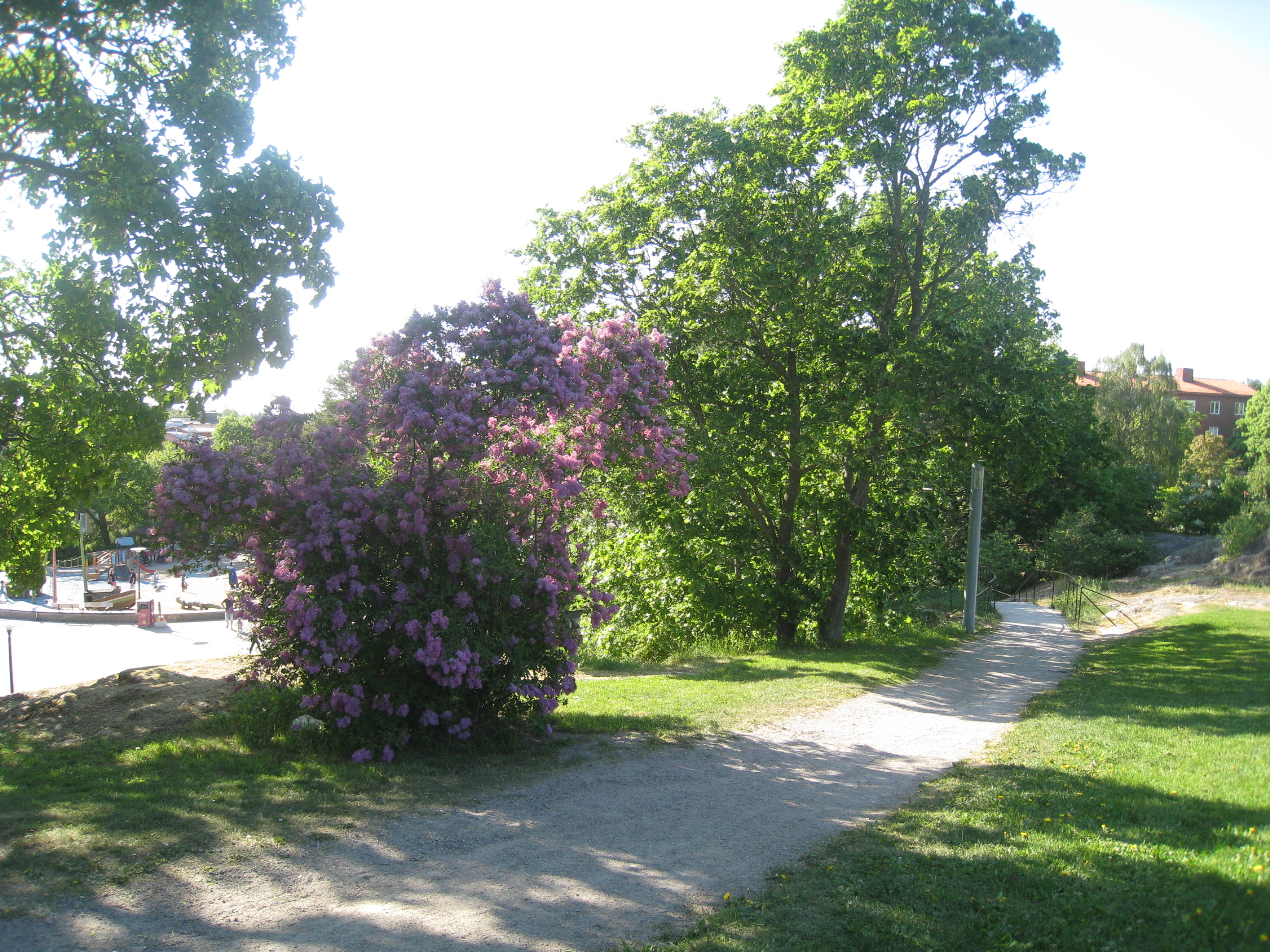 Tornparken i Centrala Sundbyberg. I parken ligger Sundbybergs vattentorn.